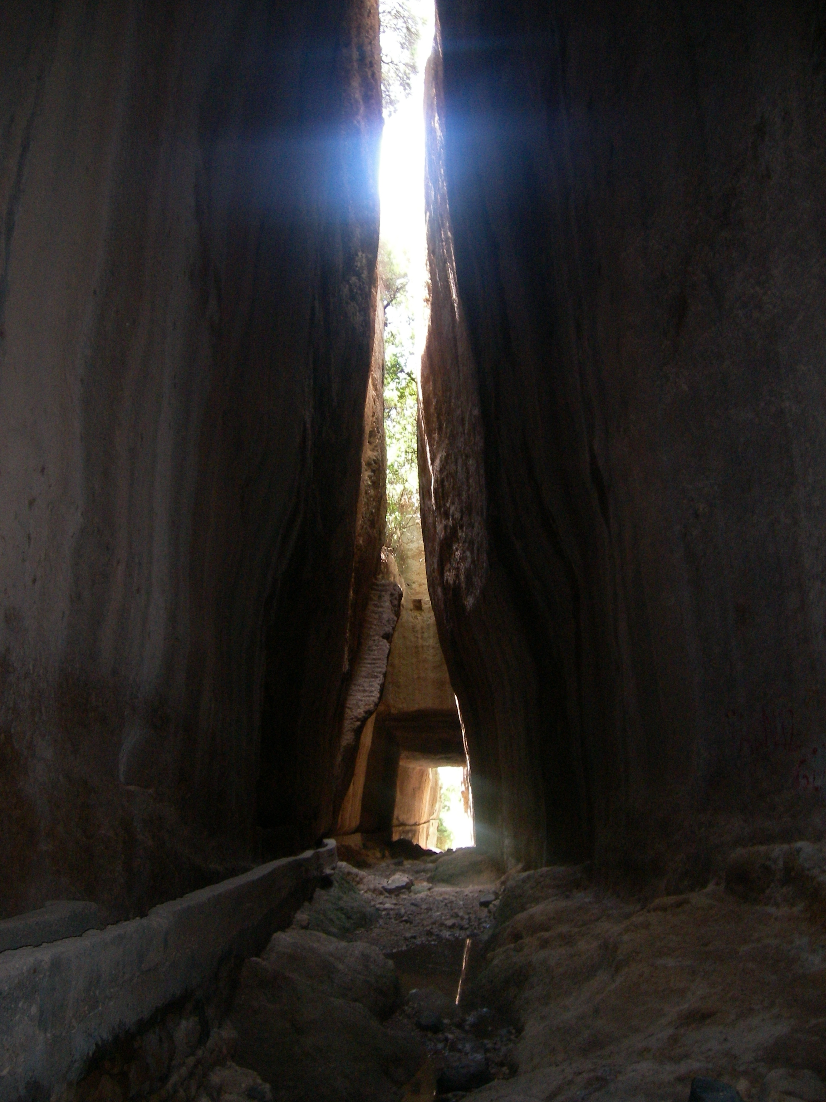 Samandağ'da Titus Tüneli